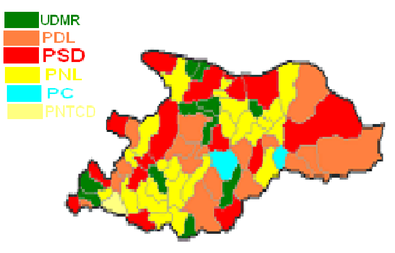 harta politica maramuresului .